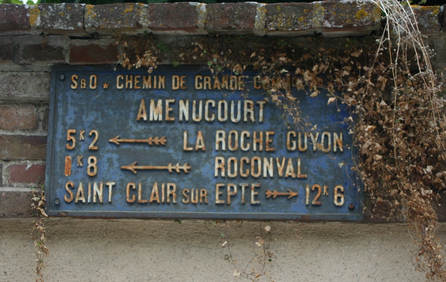 Ancienne plaque indicatrice, Amenucourt - Val-d'Oise, France